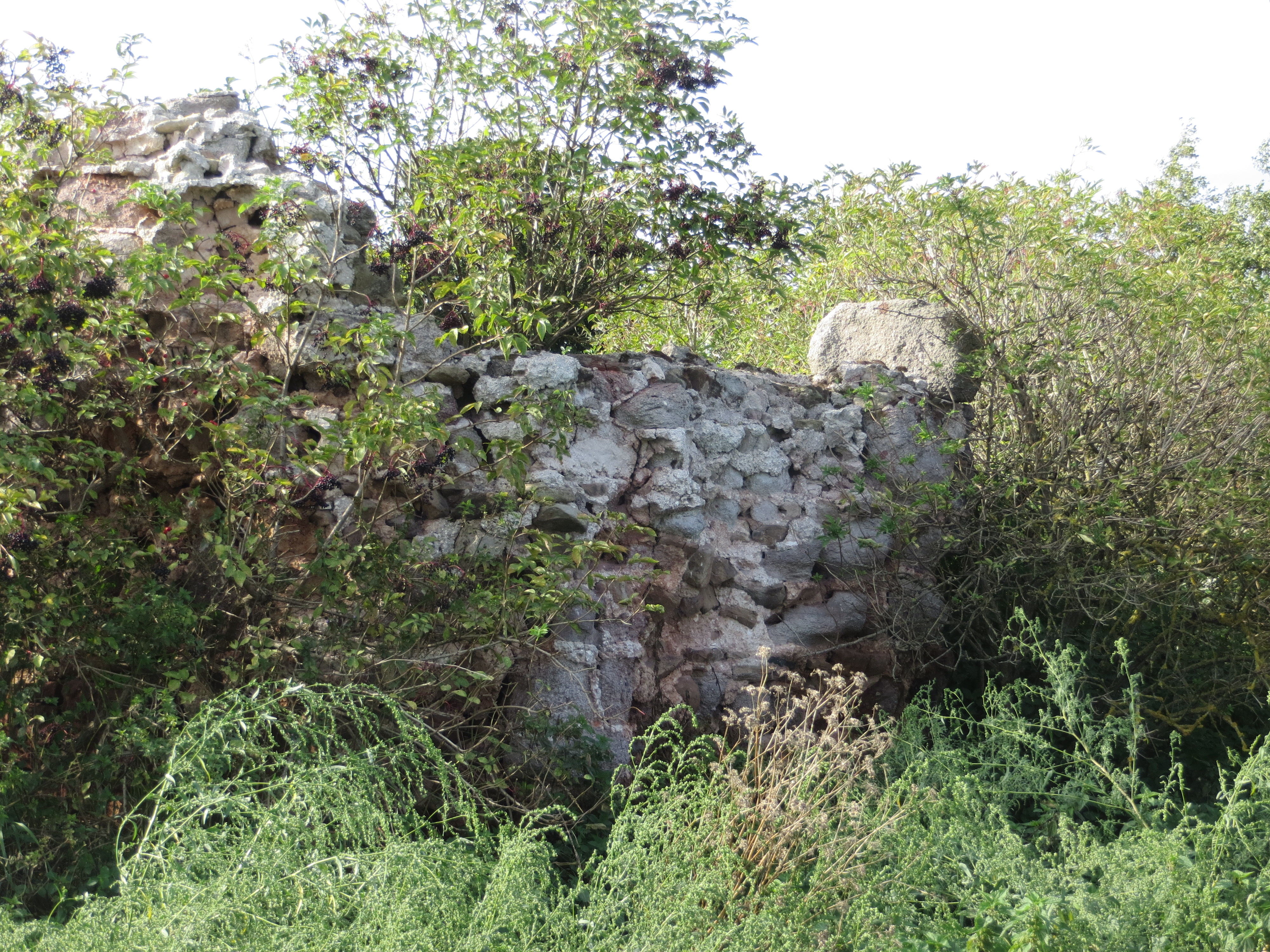 Die Wüstung Lindeschu nordöstlich von KelbraThis is a photograph of an architectural monument. 84697